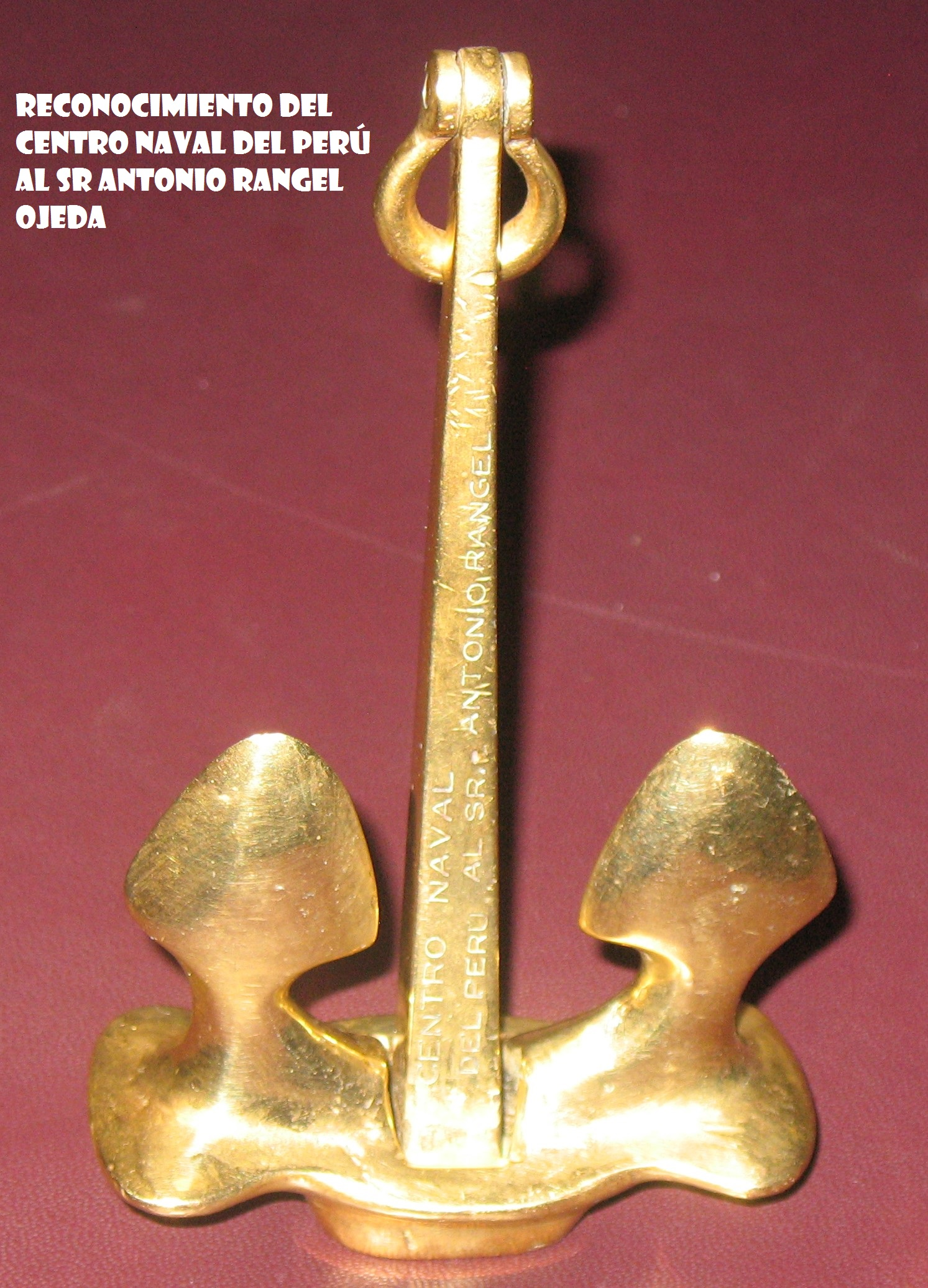 Reconocimiento del Centro Naval del Perú al Sr. Antonio Rangel Ojeda por su contribución al bádminton de ese país